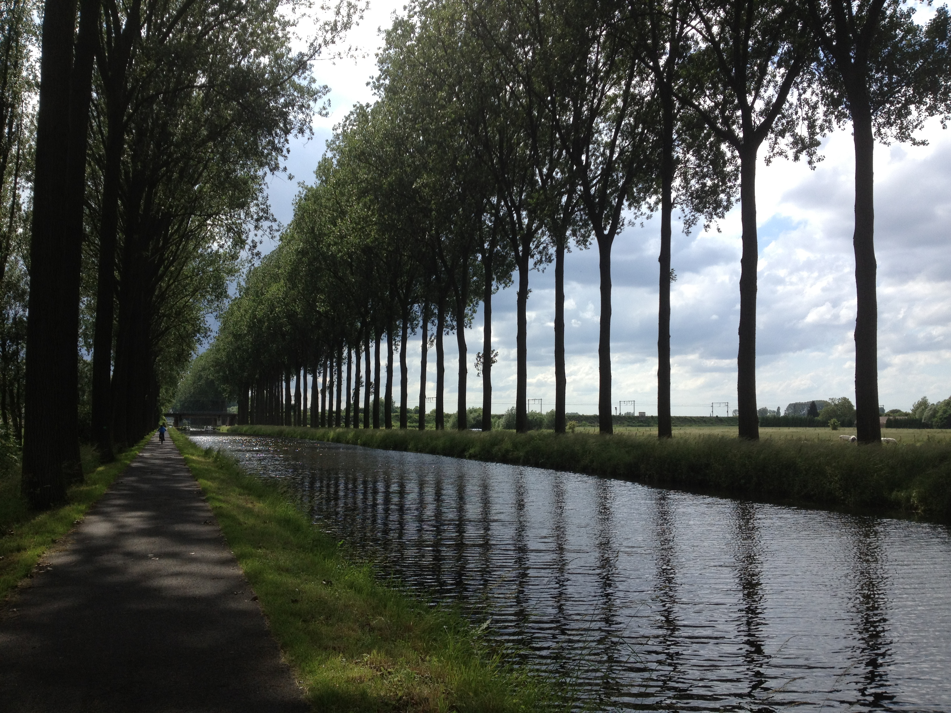 Le canal de l'Espierres à Estaimpuis bordé de ses majestueux peupliers